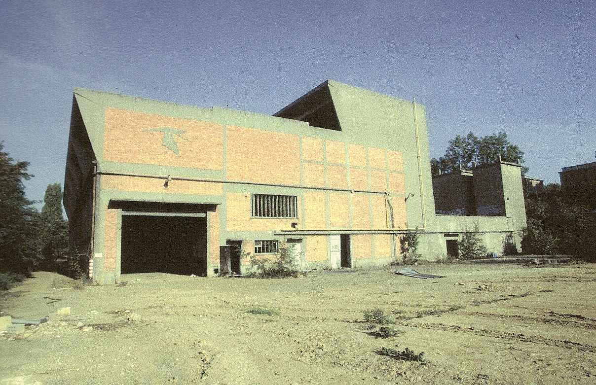 Bâtiment industriel Hispano à Guyancourt